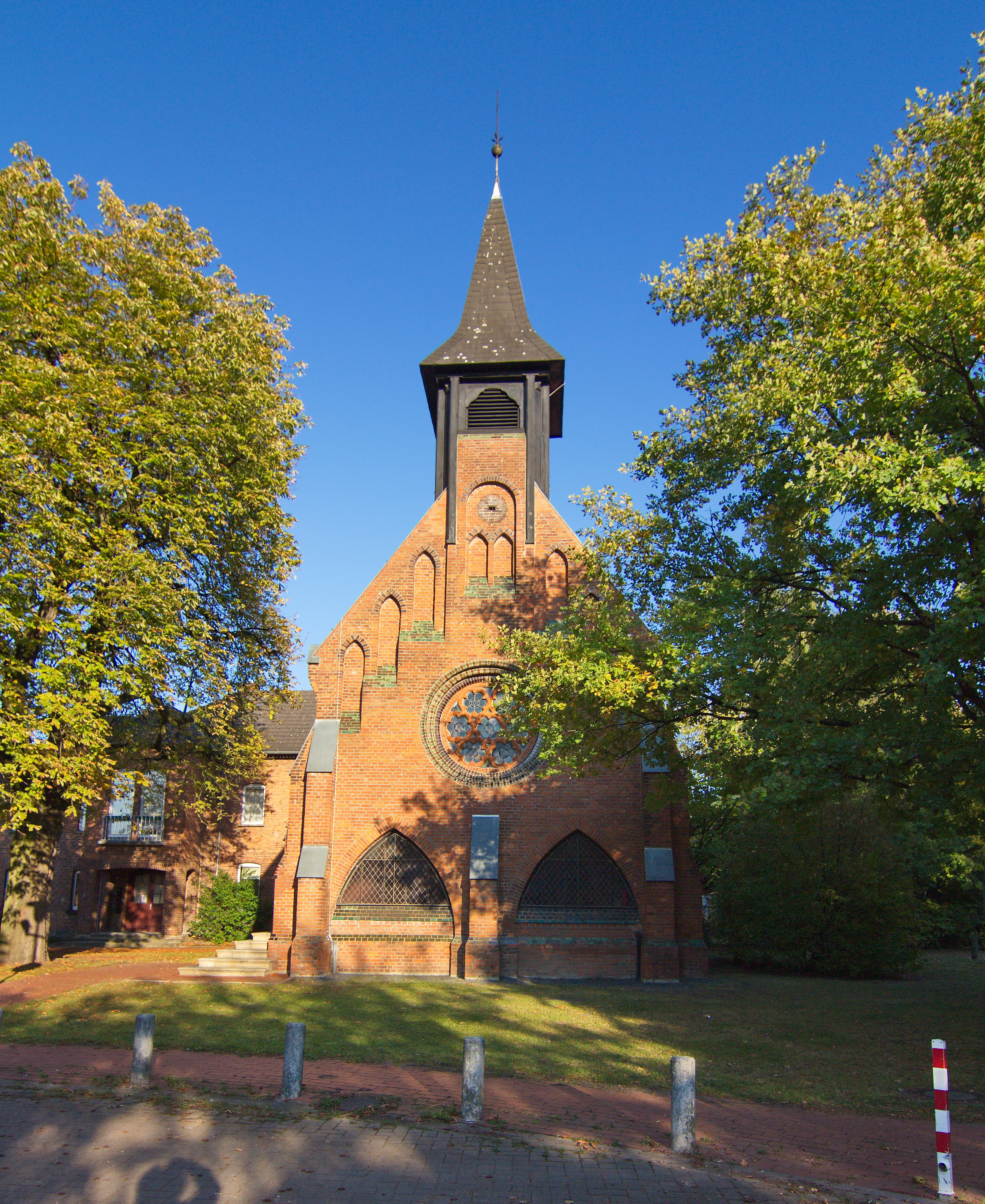 Baudenkmal St. Johanniskapelle, Armenhaus und ehemalige Schule an der Wülfeler Str. 5 in Bemerode (Hannover), Niedersachsen, Deutschland